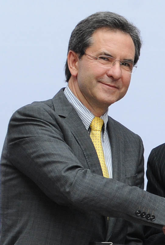 Fotografía del Gobierno del Estado de Aguascalientes, 2010-2016, disponibles en su cuenta de flickr: [1]